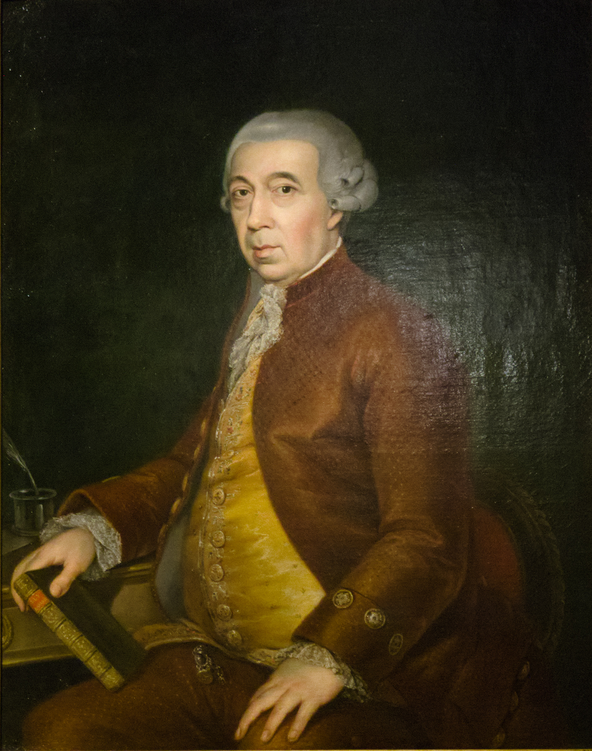 Retrato del político e ilustrado español Gaspar Melchor de Jovellanos (1744-1811).